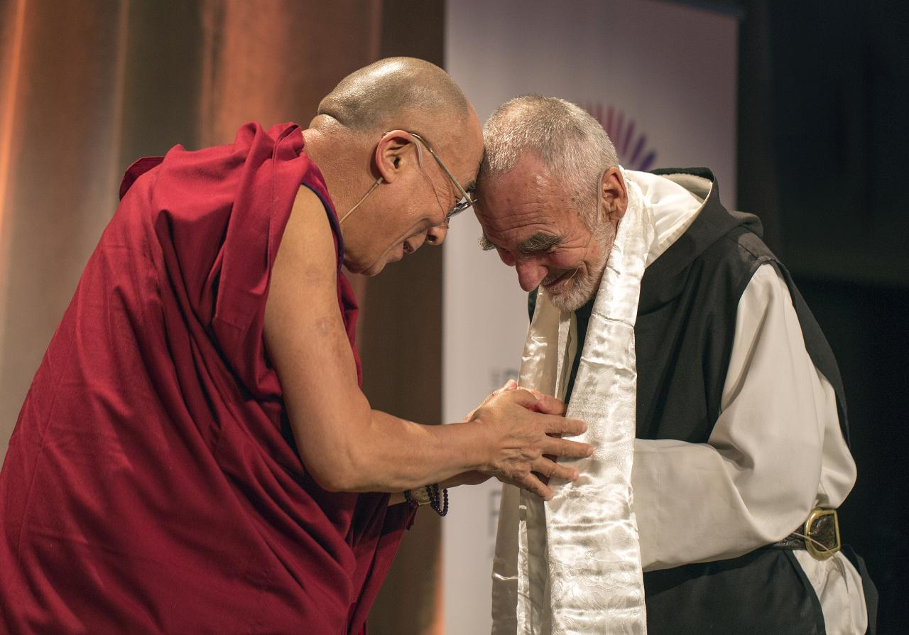 dalailama1_20121014_4586